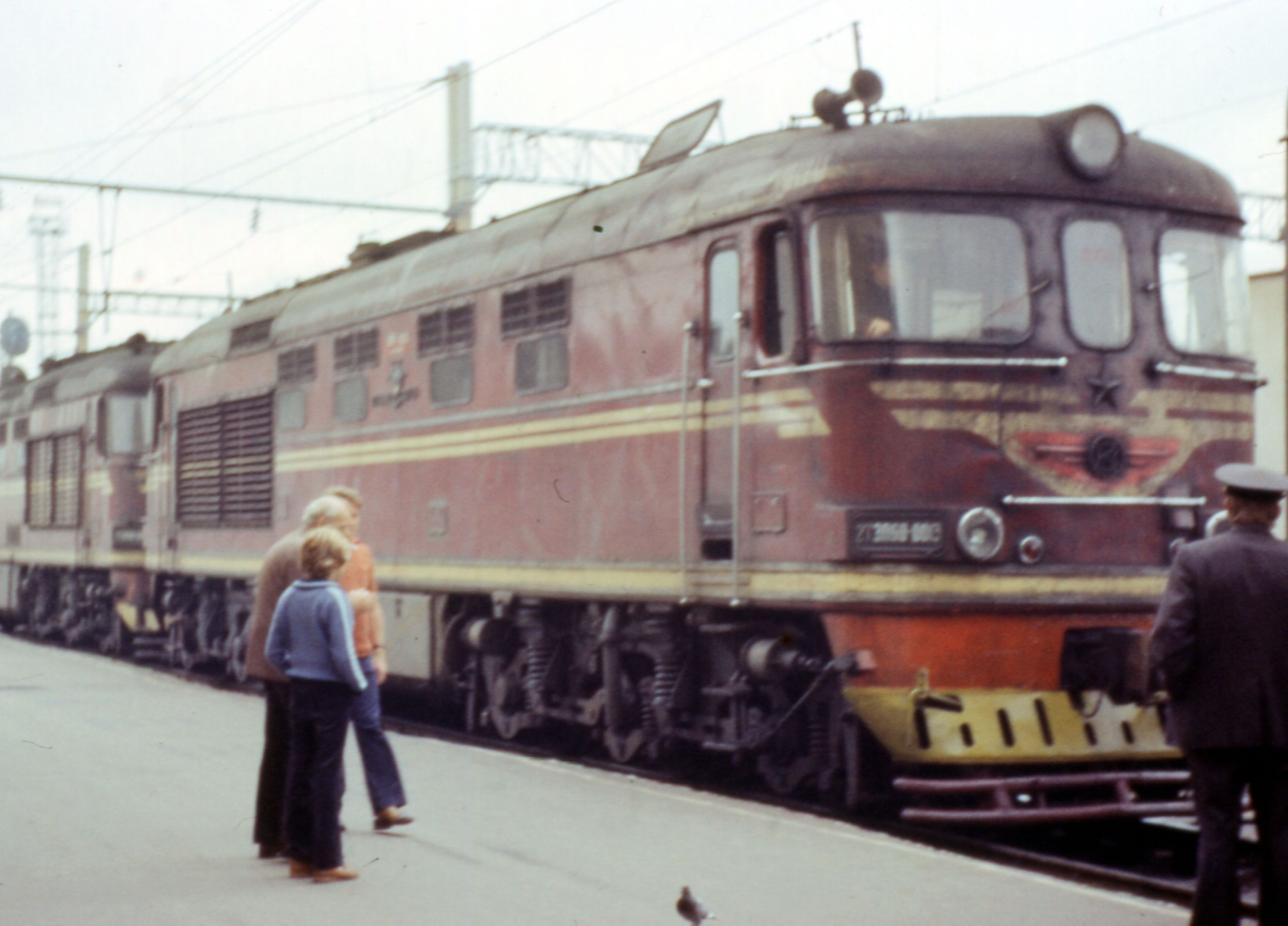 Sowjetunion, Leningrad, Moskau, Minsk 1980; Soviet Union 1980